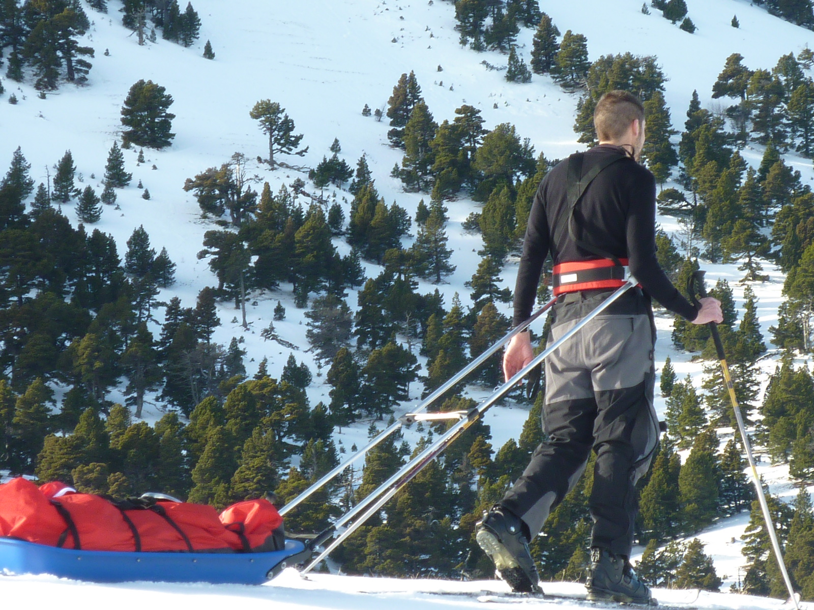 Skieur de randonnée nordique tractant une pulka en plastique dans le massif du Vercors (France)